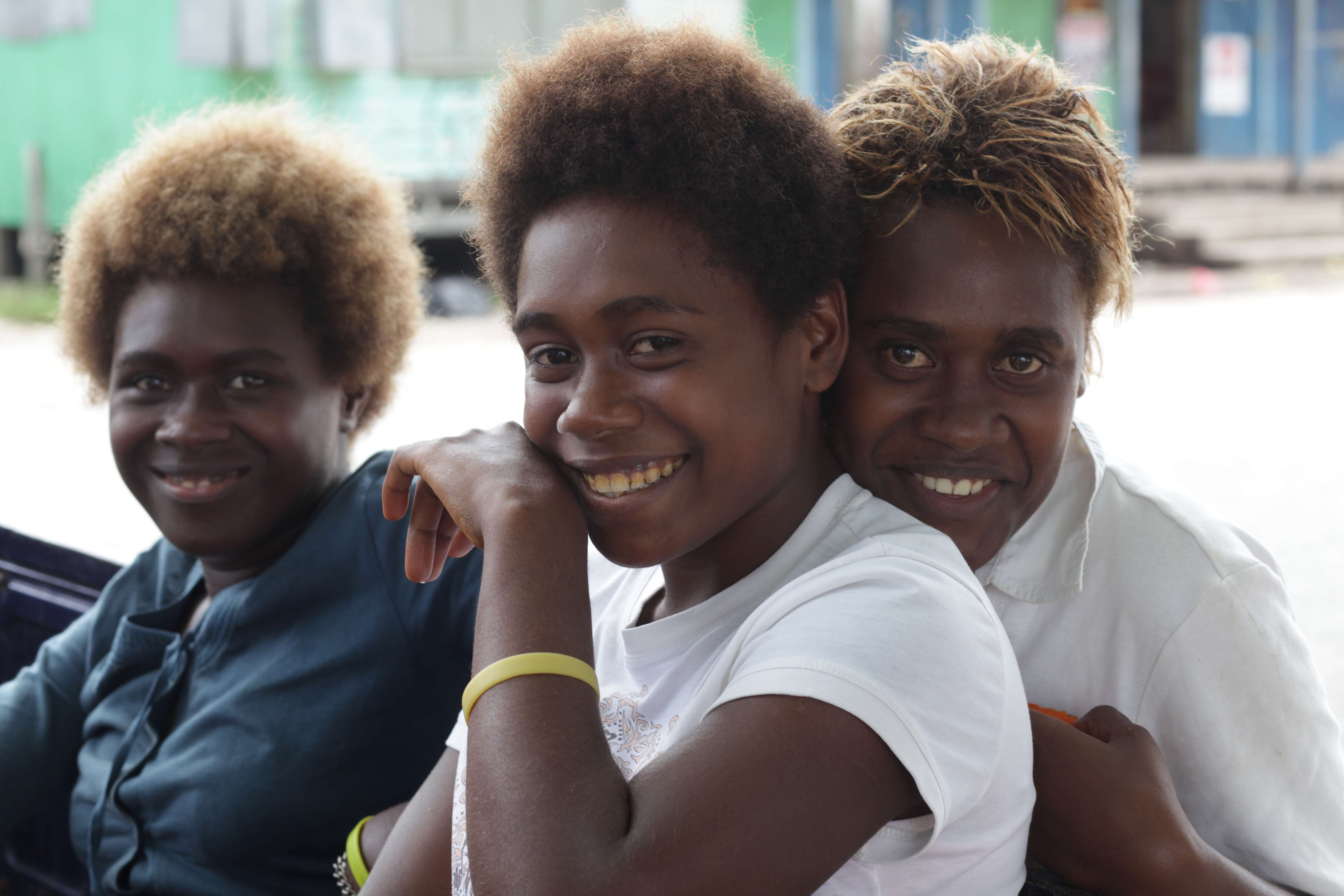 Friends